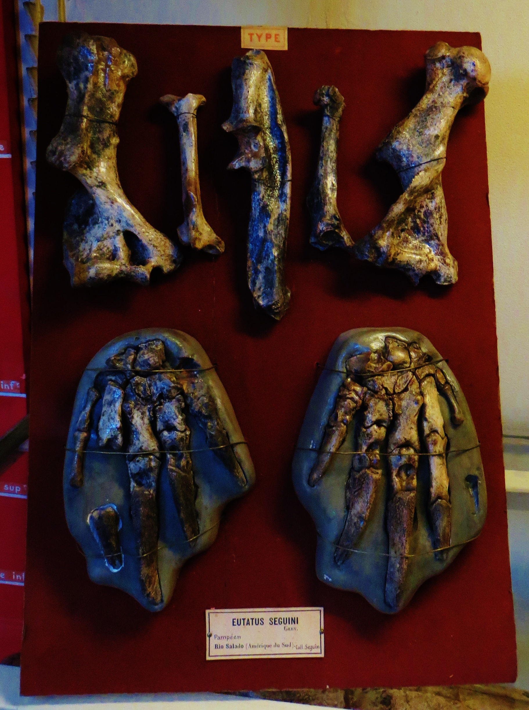 Fossil of Eutatus, an extinct mammal- Took the photo at Musee d'Histoire Naturelle, Paris